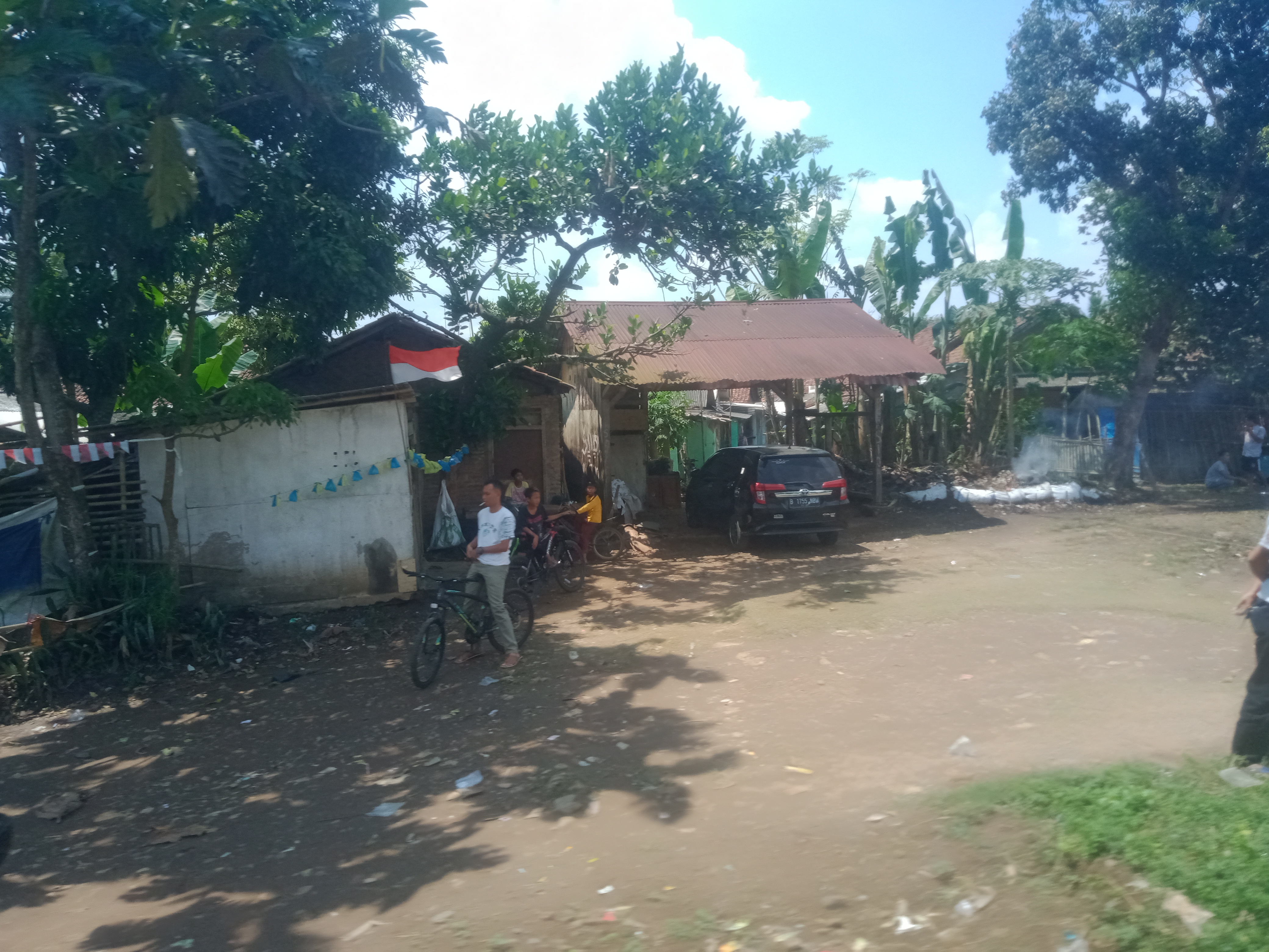 Eks halte Silebu